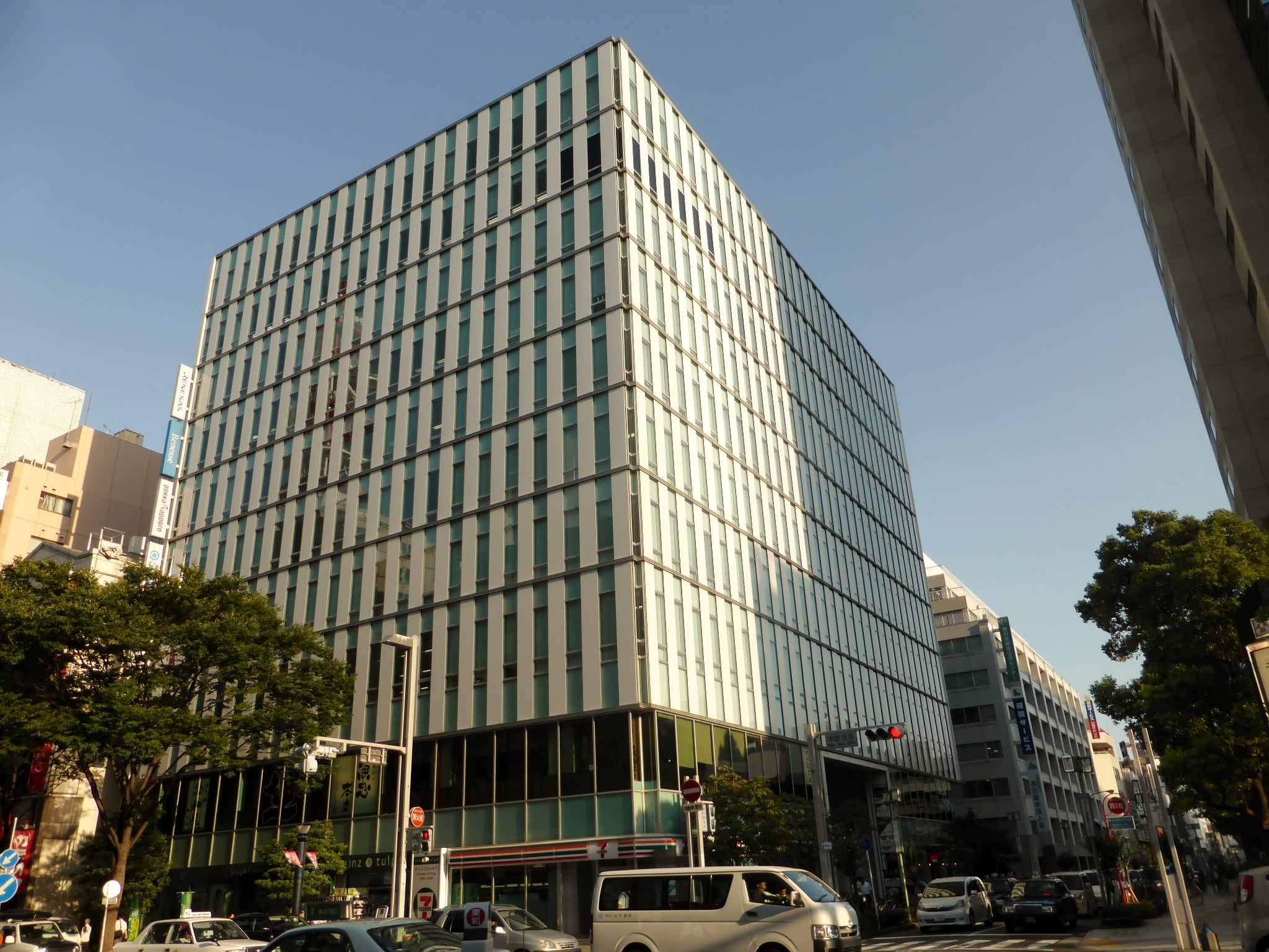 名古屋市中区栄四丁目の名古屋広小路プレイスビルを撮影